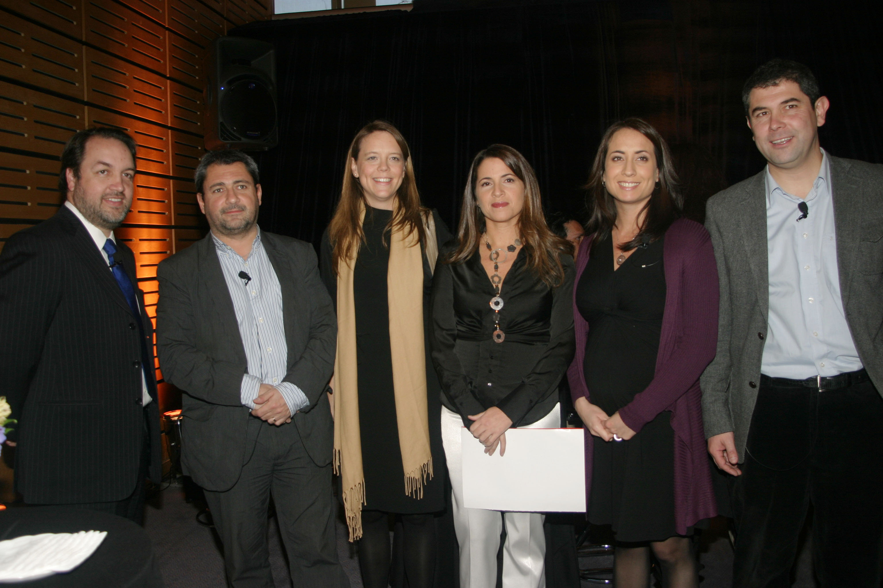 Estado nacional es un programa de televisión chileno, de tipo actualidad y debate político, conducido por la periodista Montserrat Álvarez, actualmente se transmite los domingos en vivo de 09:30 a 11:00.